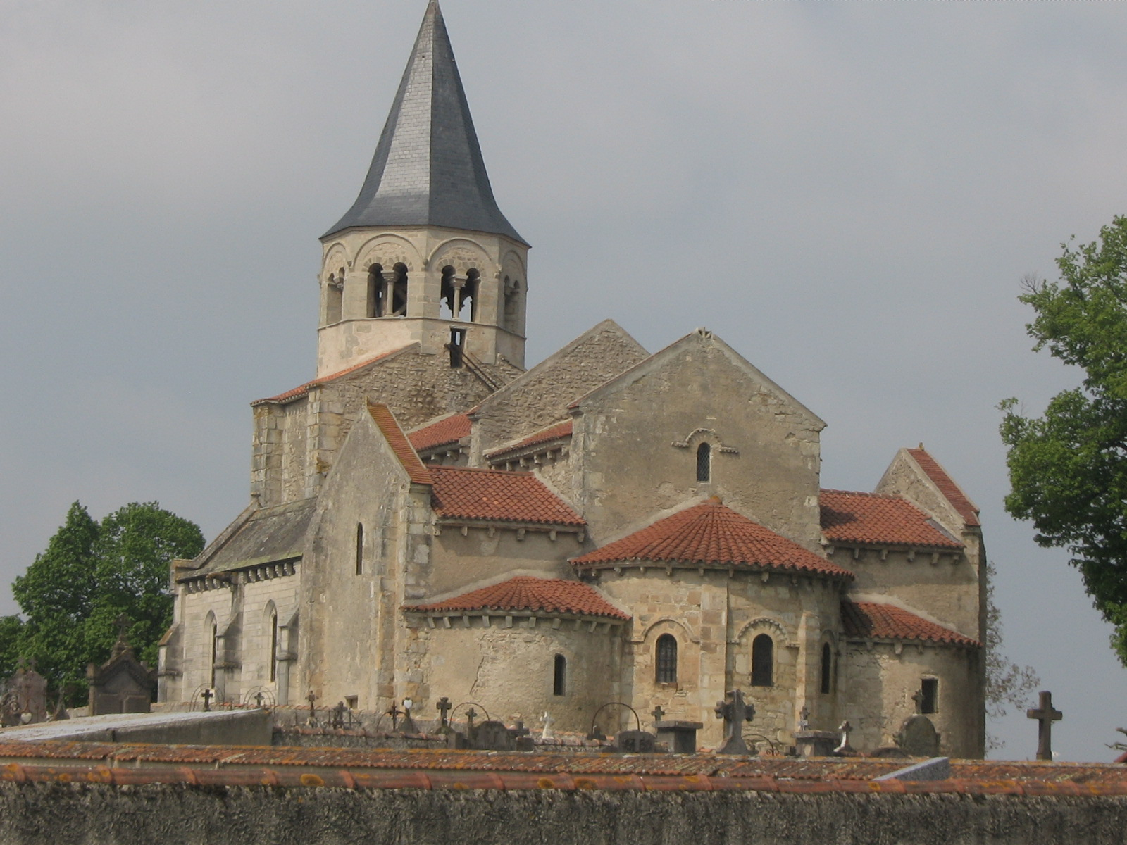 Eglise de Cognat